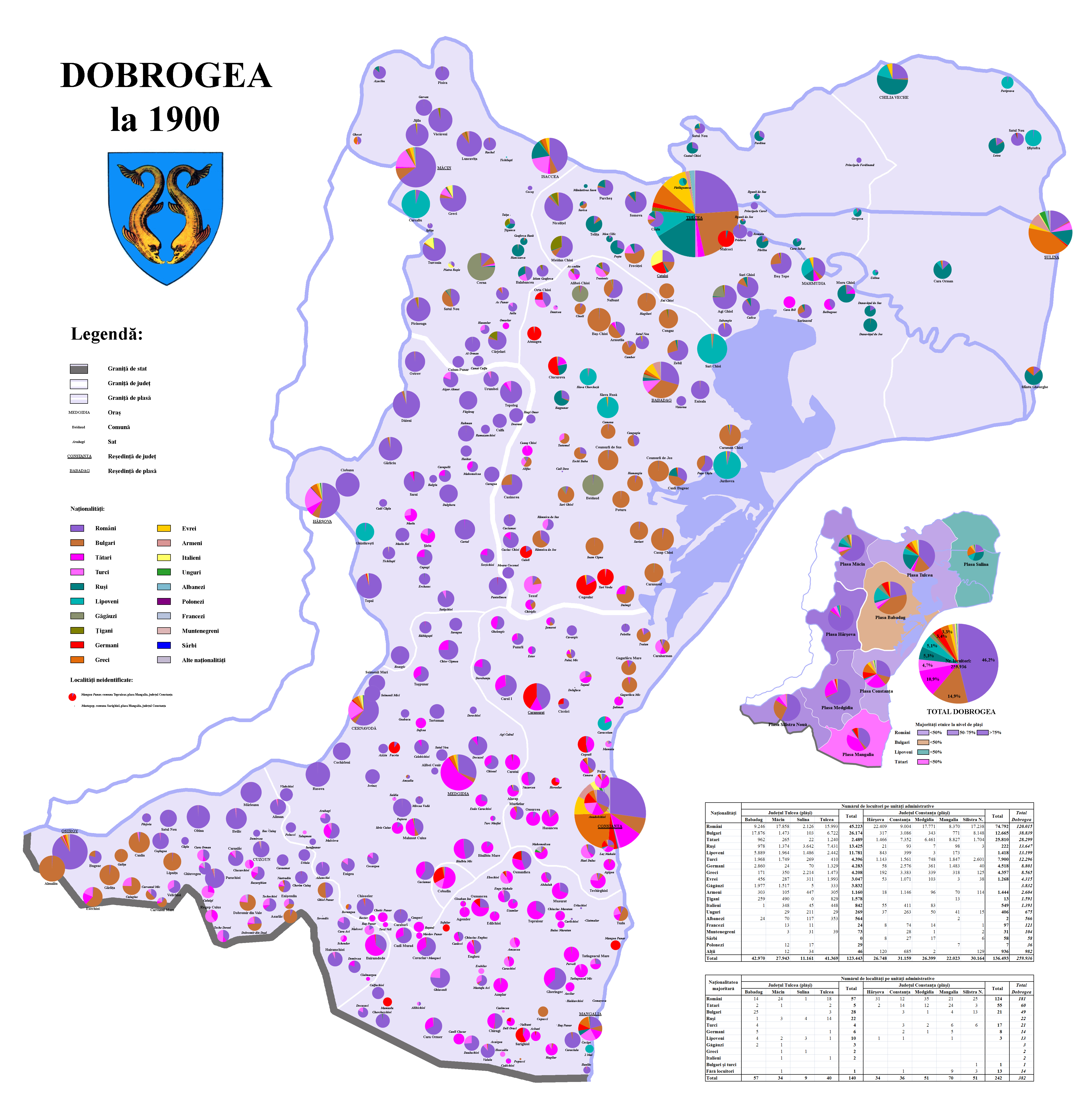 Harta etnică a Dobrogei la 1900